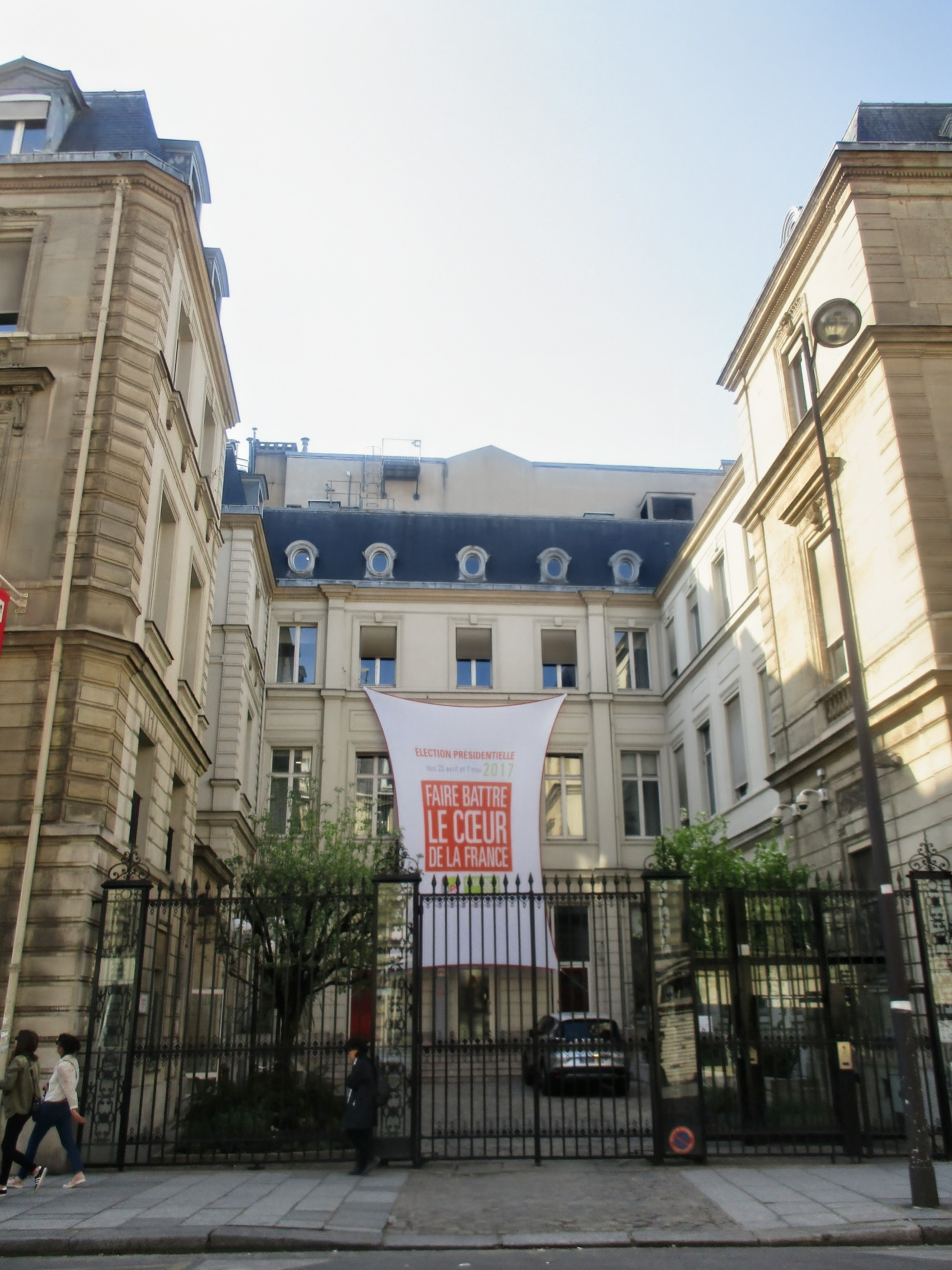 Siège du parti socialiste, rue de Solférino, pendant la campagne présidentielle de 2017 avant le premier tour.